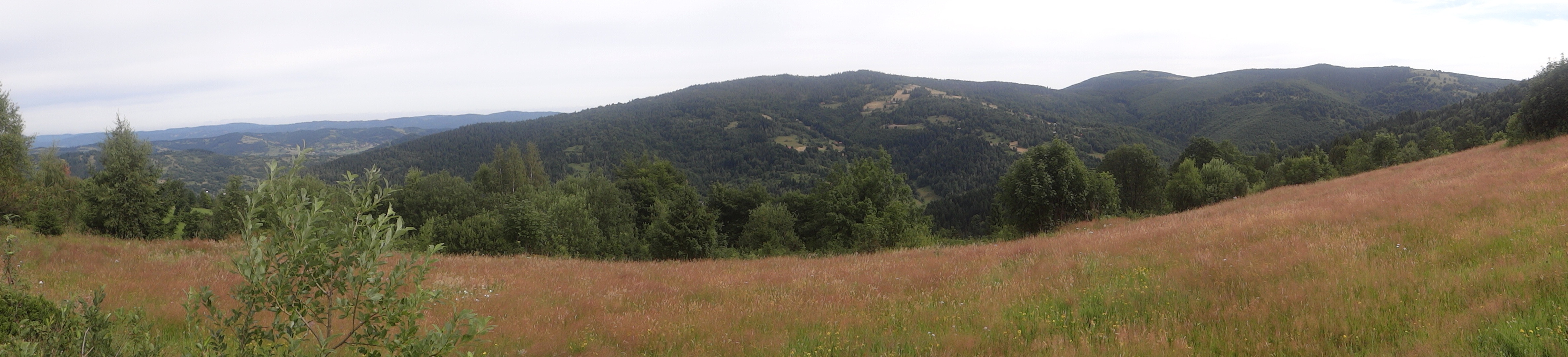 Widok z okolic Kalikowego Gronia na Lachów Groń, Jałowiec i Czerniawę Suchą